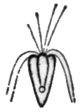 Pyramimonas tetrarhynchus